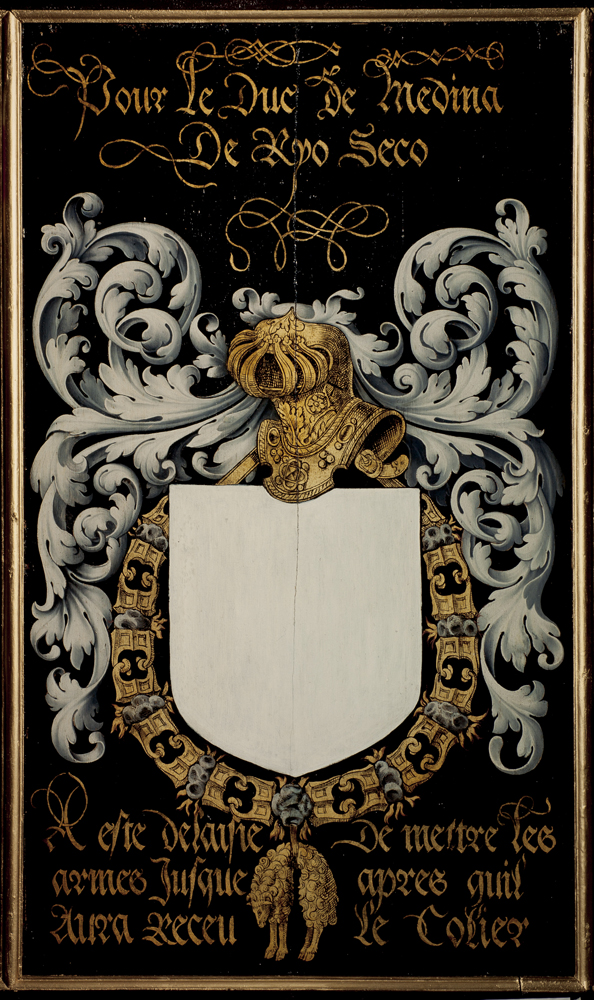 schilder uit Valenciennes; vermoedelijk Jacques Le Boucq, Blazoen van het 23ste Gulden-Vlieskapittel, 1559, Duc de Medina de Ryo Seco; inv: 433 N.219